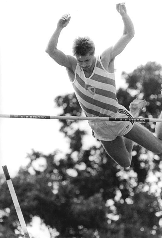 Uwe Langhammer ADN-ZB Koard 21.8.87-ce-Potsdam: 38. DDR-Leichtathletik-Meisterschaften. Uwe Langhammer vom SC Motor Jena erzielte in der Stabhochsprungkonkurrenz mit 5,65 Meter einen neuen DDR-Rekord.